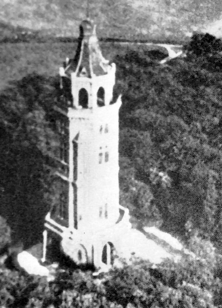 Kaiser-Wilhelm-Turm im Hallopark, Essen-Stoppenberg, eingeweiht am 10. Juni 1899